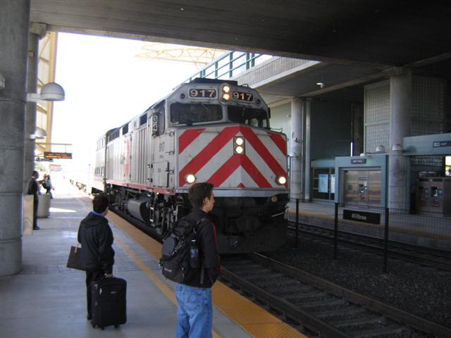 КалТрейн на гара Милбрей, Калифорния (авторска снимка)